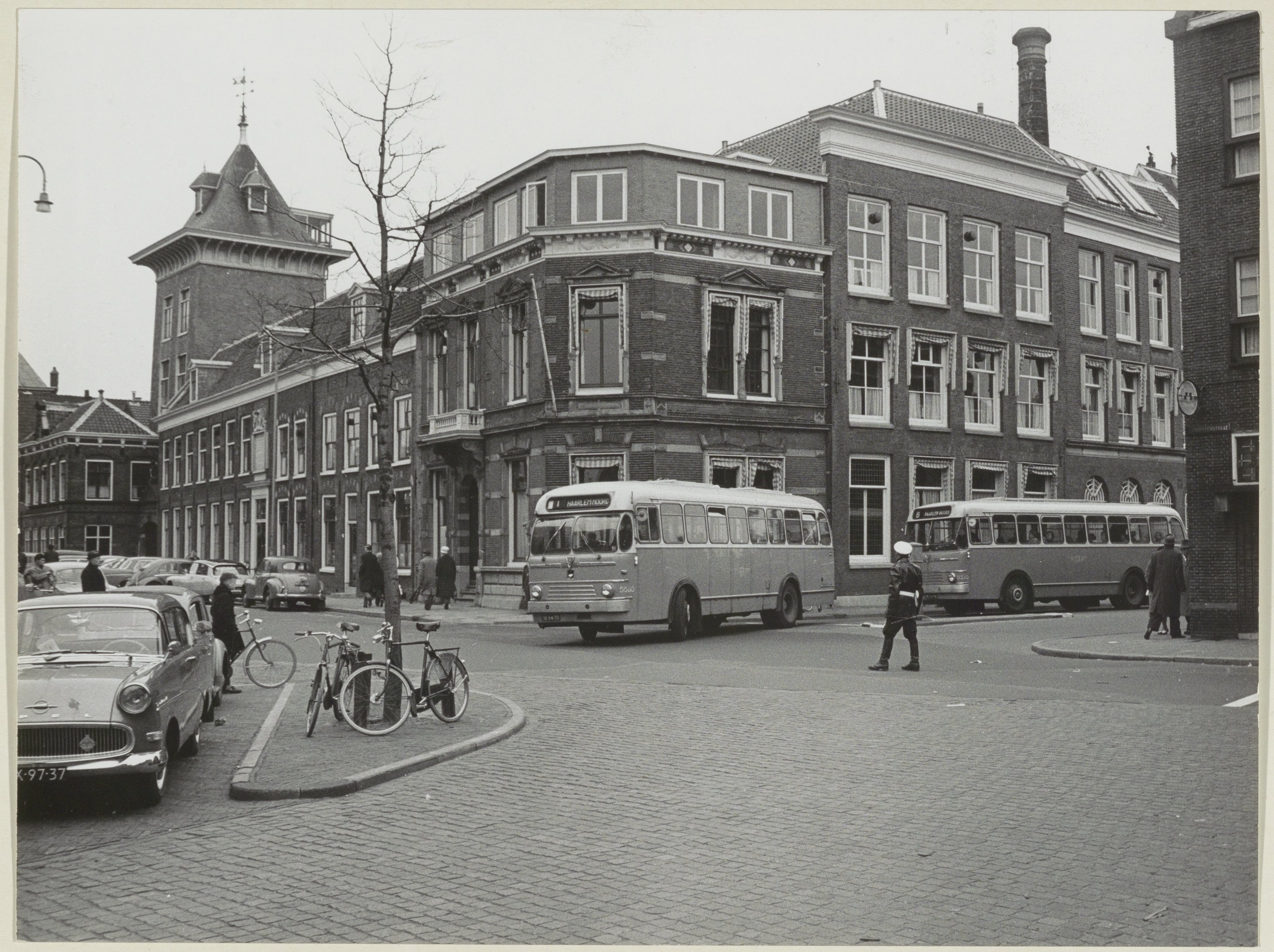 CollectieCollectie Fotoburo de BoerInventarisnummerNL-HlmNHA_54004420BeschrijvingGrafische inrichting Joh. Enschedé en Zn. aan het Klokhuisplein / hoek Damstraat, met NZH bussen en verkeersagent.FotonummerNL-HlmNHA_1478_2450DocumenttypeTopografische prenten, tekeningen en foto'sVervaardigerBoer, Cees de (1918-1985) Soort vervaardigerFotograaf LandNederland ProvincieNoord-Holland GemeenteHaarlem PlaatsHaarlem StraatKlokhuisplein BegindatumHerfst 1960EinddatumHerfst 1960TechniekFoto Trefwoordenbedrijven, verkeer en vervoer